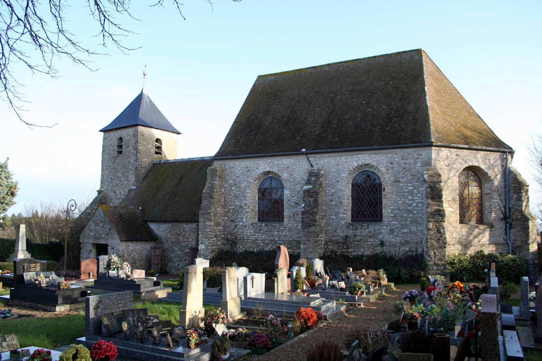 Église de Jouy-Mauvoisin - Yvelines (France).